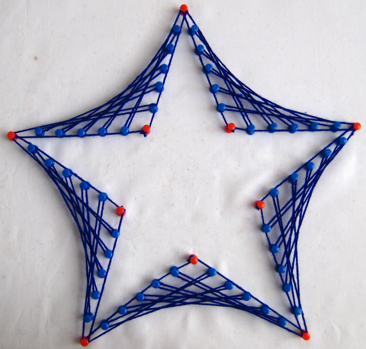 String Art Star Design